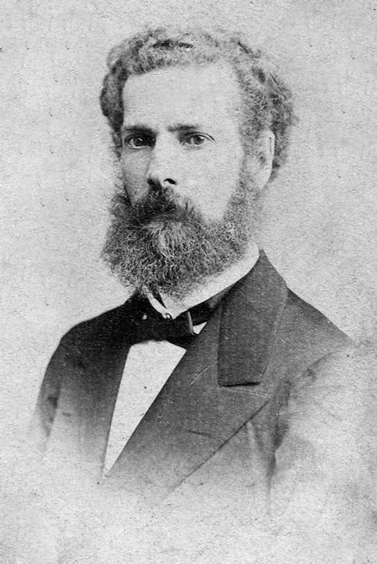 José María Samper Agudelo